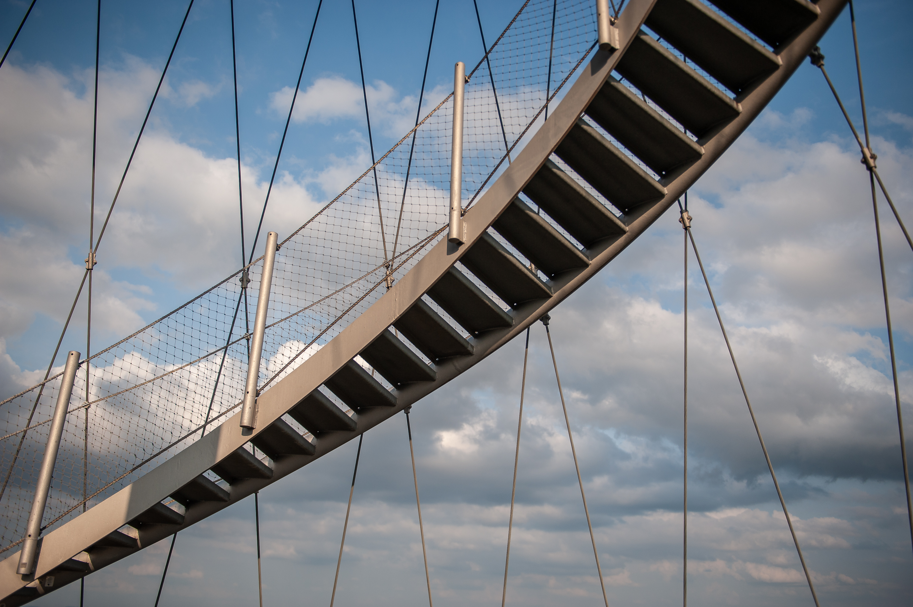 Killesbergturm, Stuttgart. Treppenstufen und Seilnetz